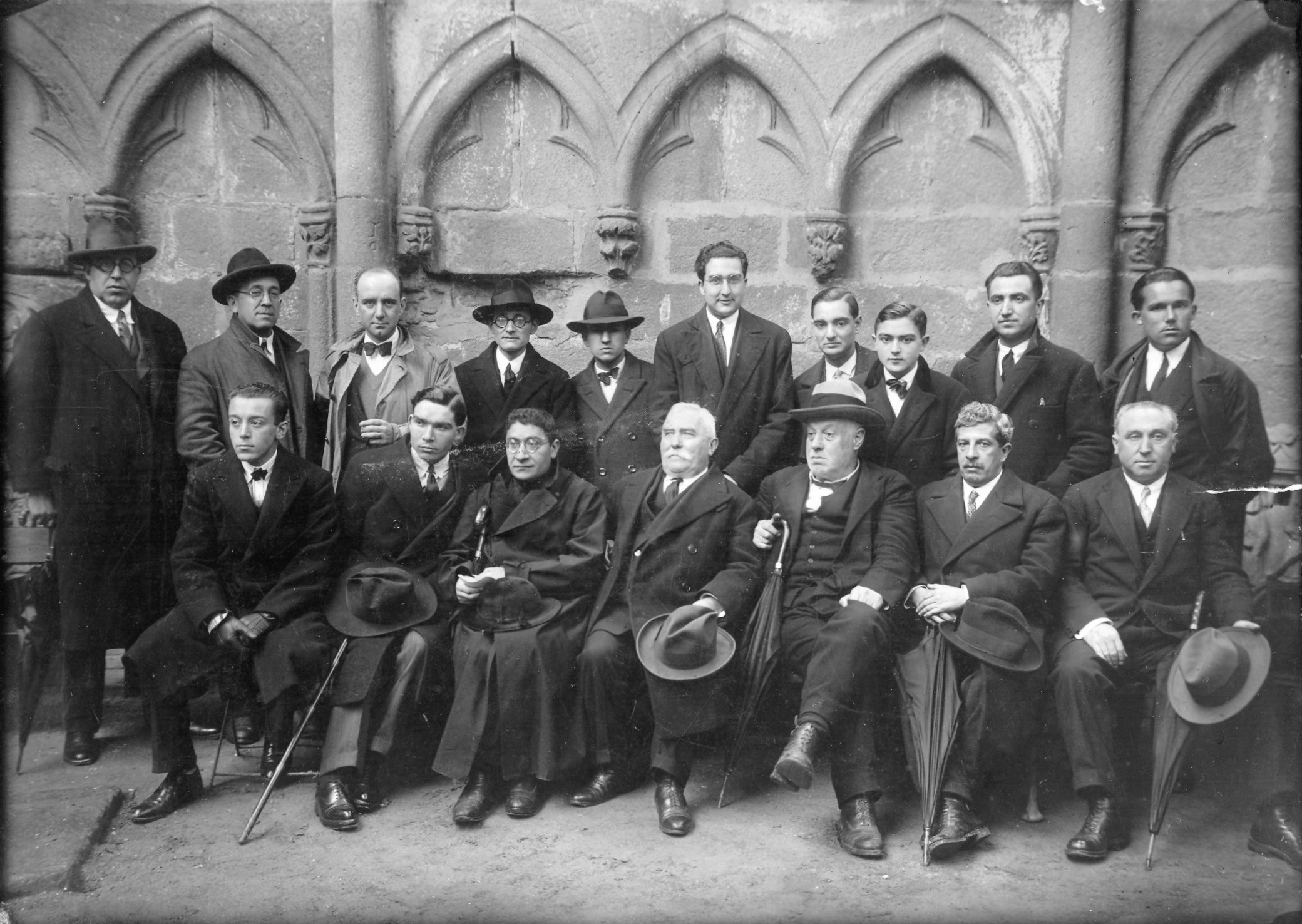 Membros do Seminario de Estudos Galegos, en 1928, nas Ruínas de San Domingos de Pontevedra.De esquerda a dereita:De pé:Otero Pedrayo, Losada, López Cuevillas, Risco, Carballo Calero, Filgueira Valverde, García Paz, Pintos Fonseca, Fraguas e Fernández Osorio-Tafall.Sentados:Parga Pondal, Moralejo Laso, Carro, Cabeza de León, Arias Sanjurjo, Álvarez Limeses e Novás.